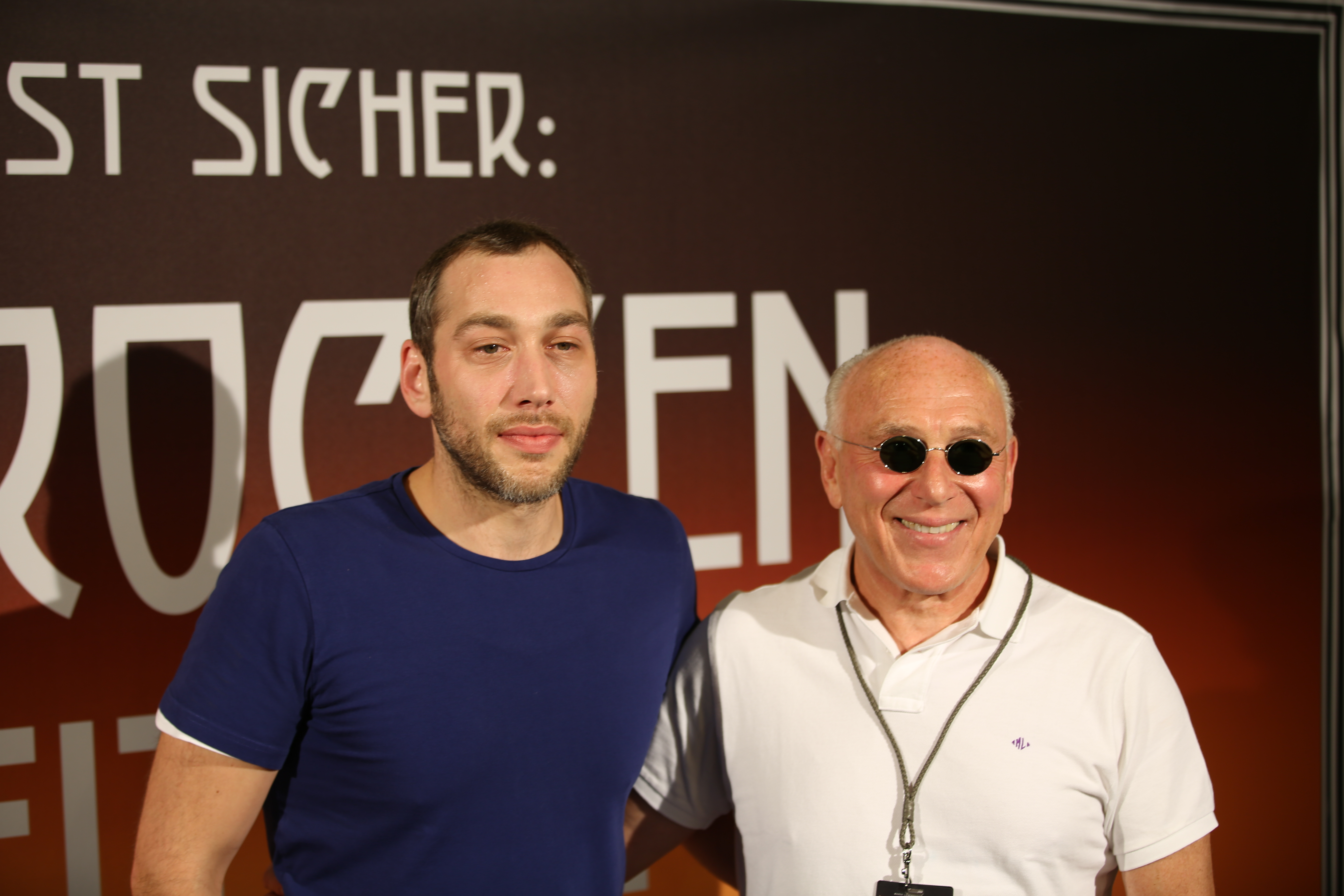 Andre und Marek Lieberberg bei Rock am Ring 2014.